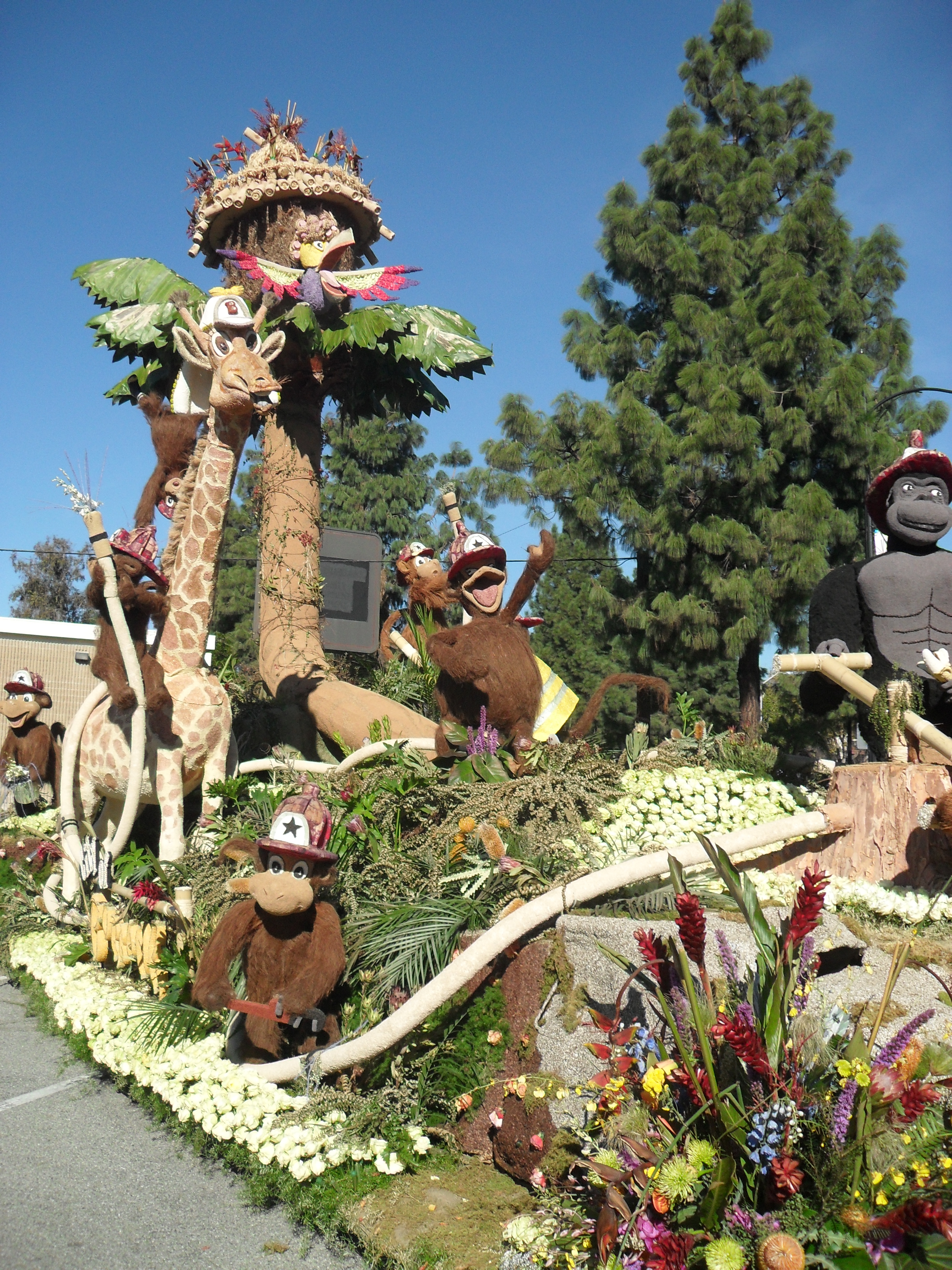 Rose Parade 2015